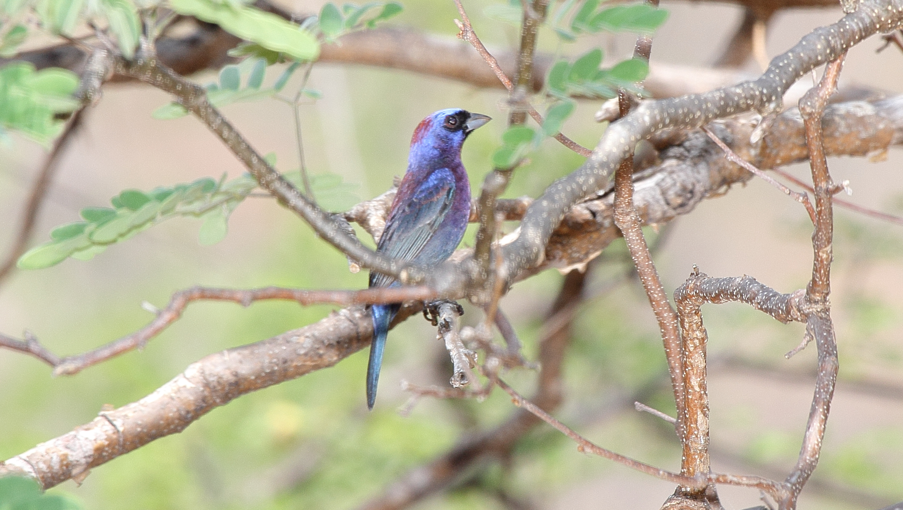 Varied Bunting (Passerina versicolor), Cabañas, Zacapa, Guatemala